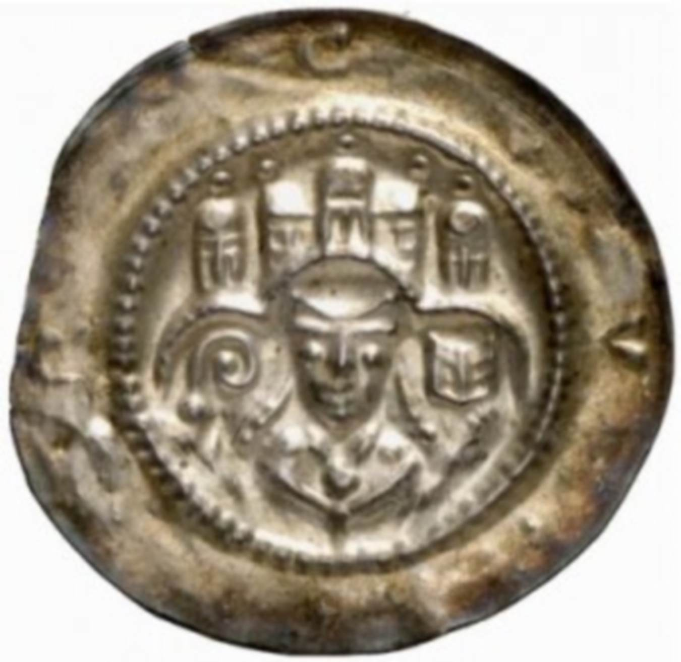 Fulda, Konrad III. von Malkos, 1222 - 1249. Brakteat. C - V - (N) - R, Unter einem Dreipaß Brustbild des Abts mit Mitra von vorne, den Krummstab mit der Krümme nach innen in der Rechten und ein geöffnetes Buch in der erhobenen Linken haltend, über dem Dreipaß fünf Türme mit Kuppeln. Gaettens 99, Buchonia I, S. 107, Abb. 15